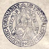 Ex libris Stempel der Ordinariatsbibliothek des Bistums Speyer, um 1860. Eigener Scan von eigenem altem Buch, von 1861